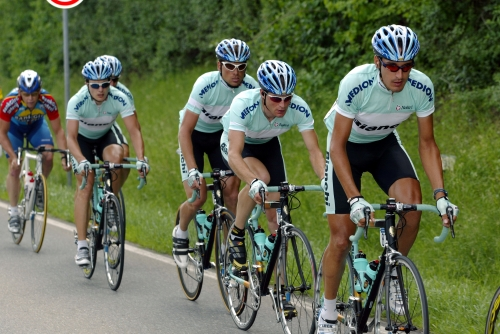 Team Bianchi Deutschland tour 2002, Angel Casero, Tobias Steinhauser, Jan Ullrich, Raphael Schweda